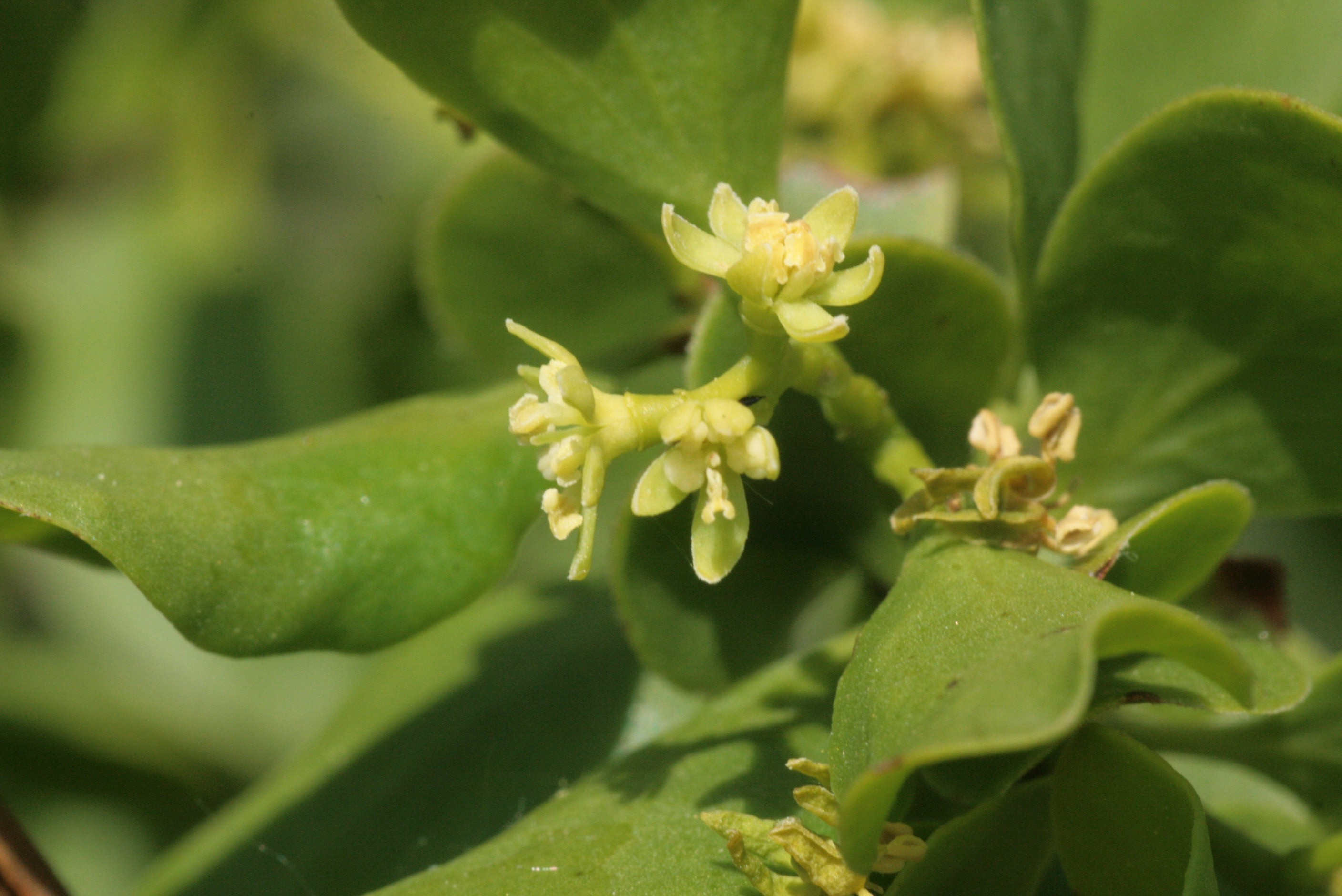 Loranthus europaeus - flos